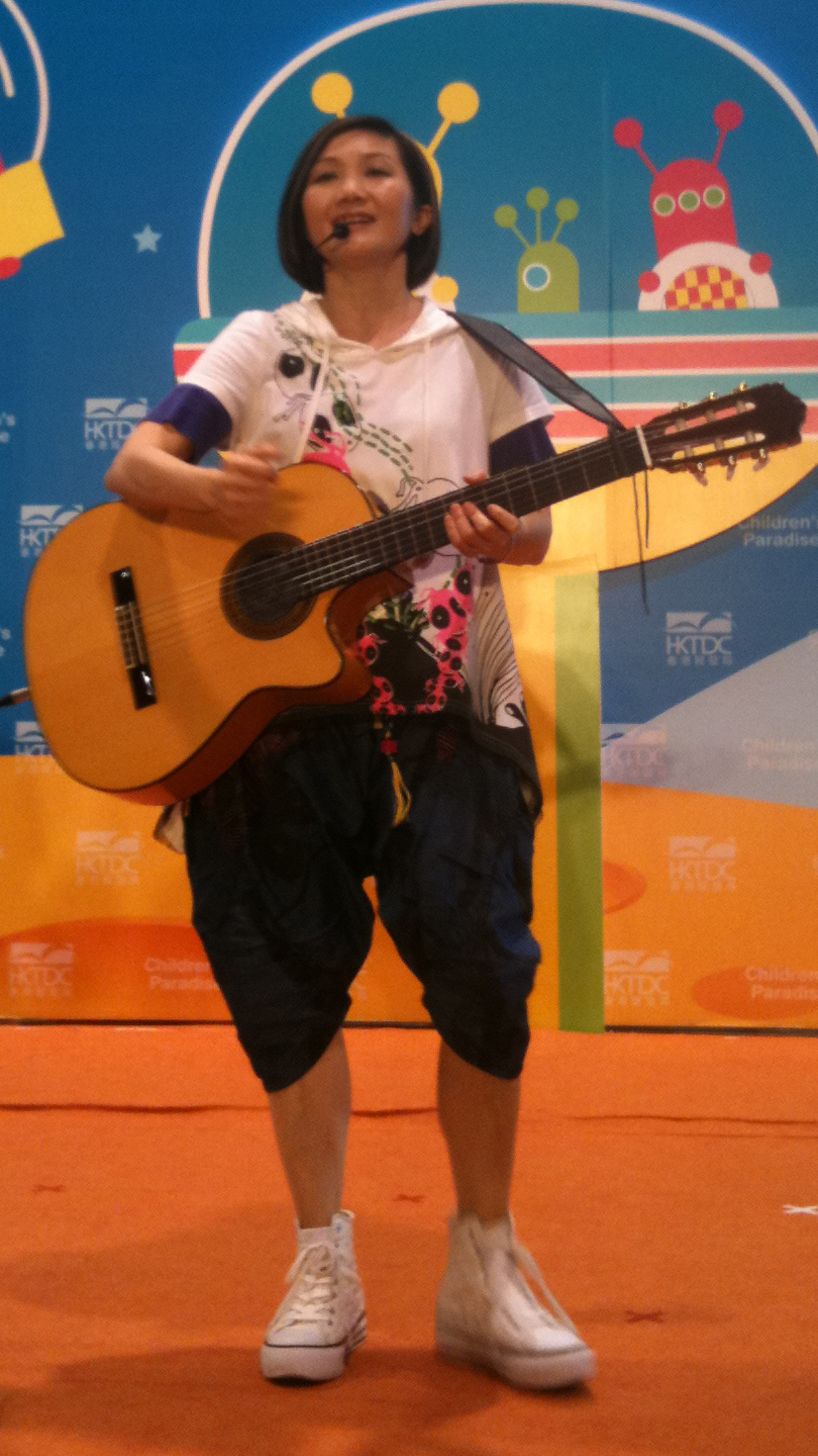 中文（香港）: 香港歌手陳美鳳於2013年香港書展。